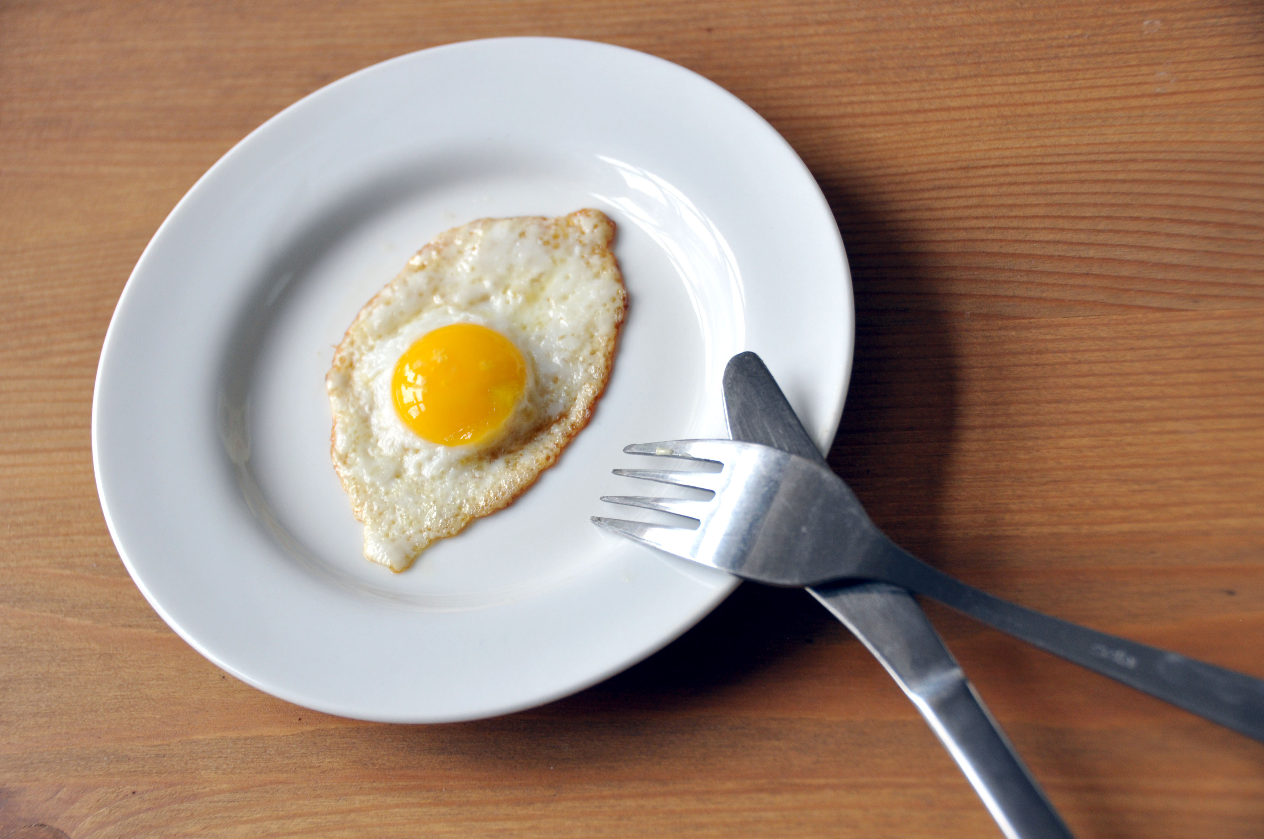 Vagtel-spejlæg